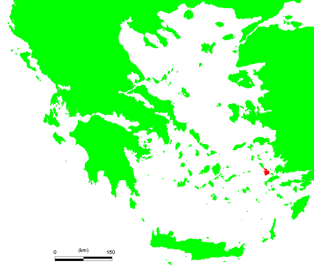 GR Kalymnos.PNG (Greek island)